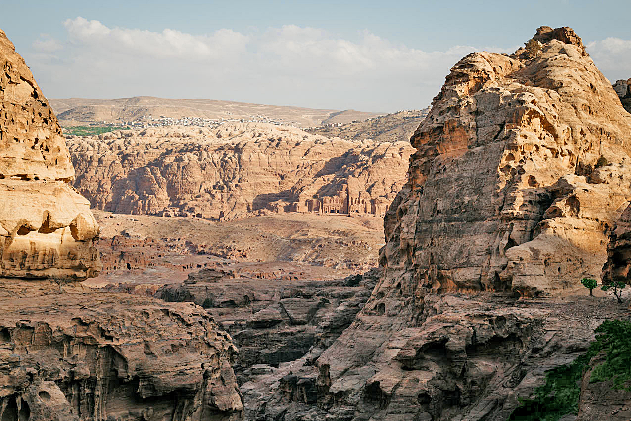 Le wadi Musa depuis les hauteurs du massif d’Umm al-Byarah à l’est de Pétra. Au fond en haut le village de Wadi Musa.